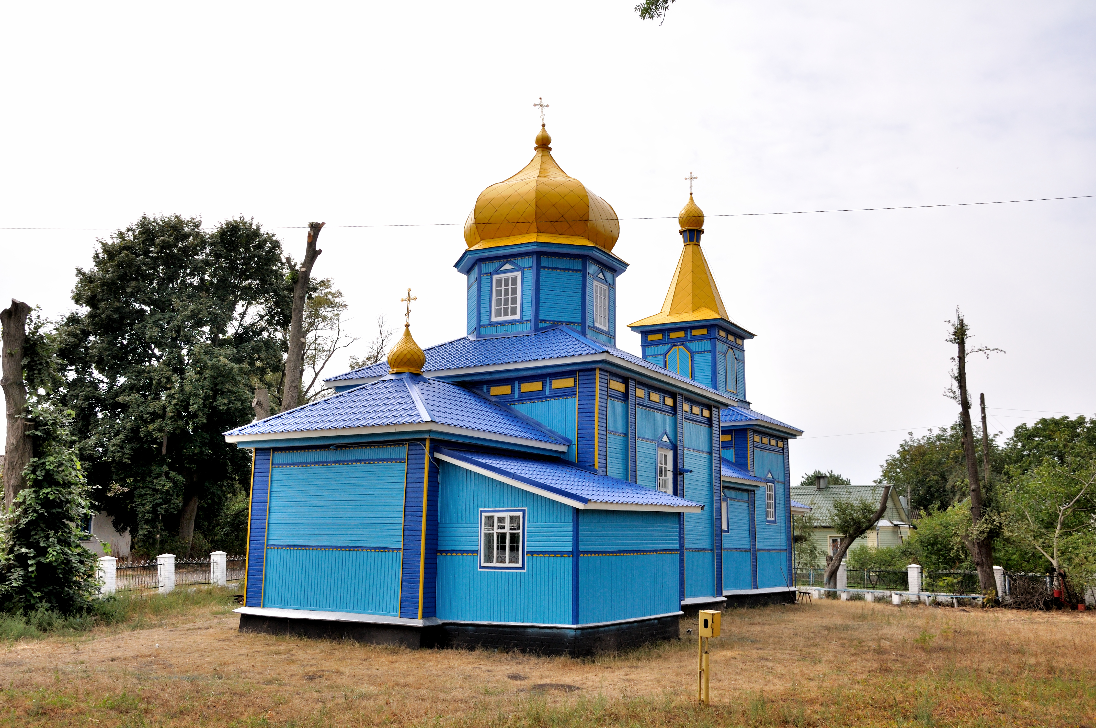 Покровська церква (дер.), с.Воскодави